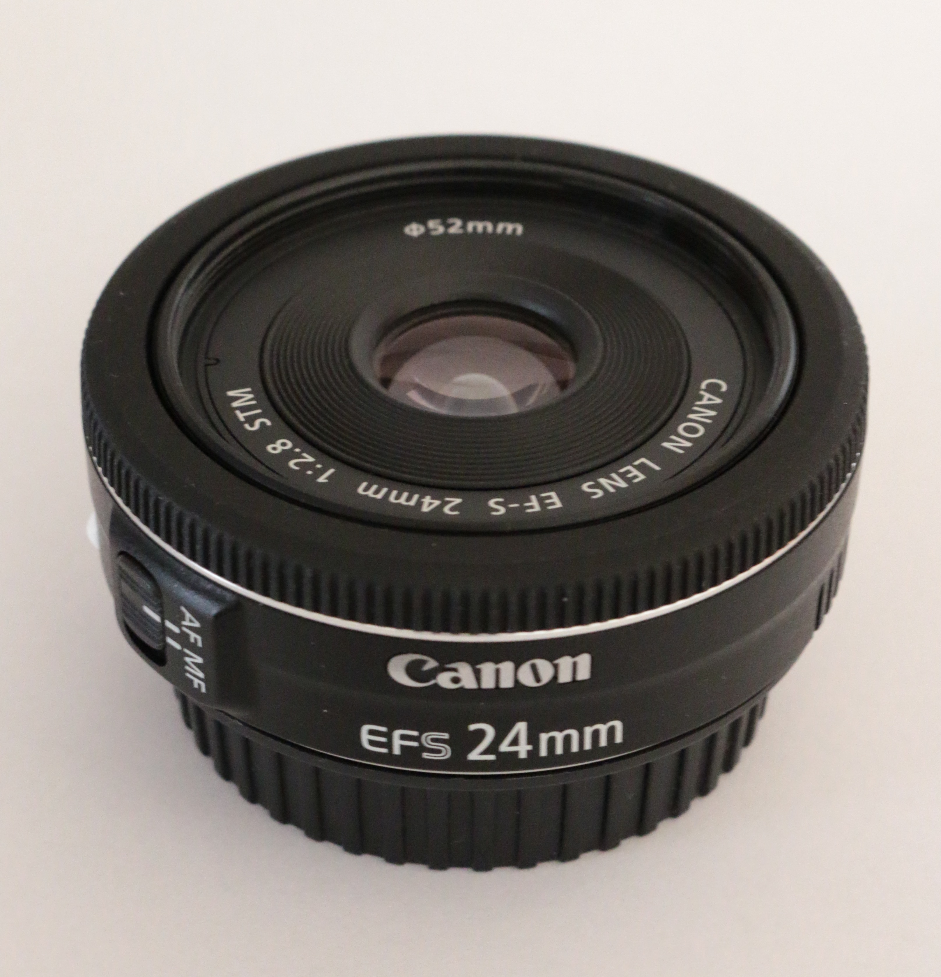 Canon EF-S 24mm F2.8 STM